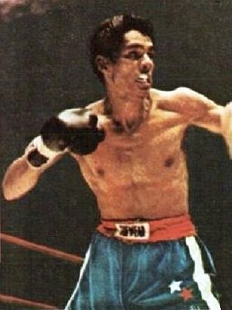 Roberto Duran en 1973 - Campioni dello Sport 1973-1974, n°301